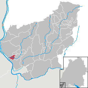 Eimeldingen, Landkreis Lörrach, Baden-Württemberg